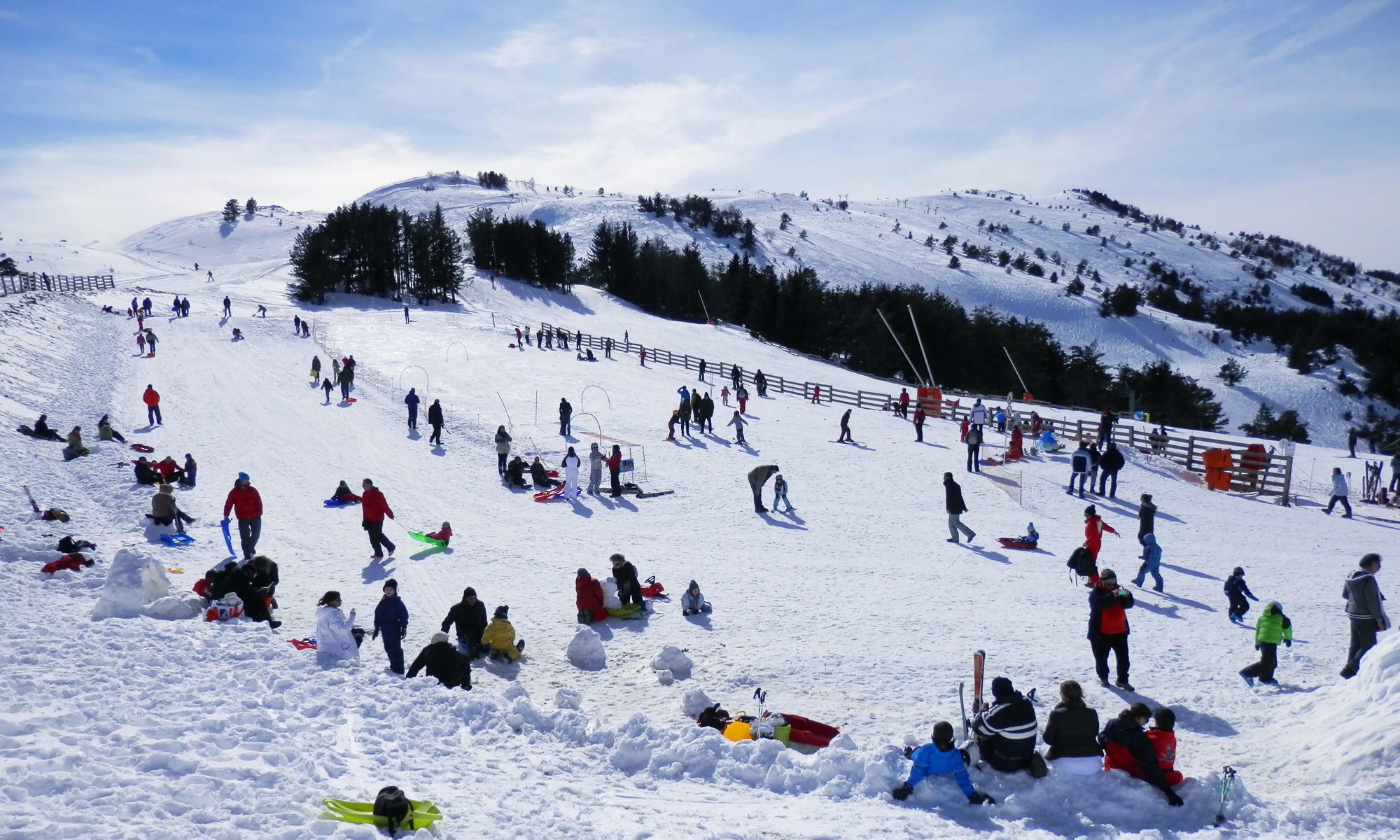 Les pistes de la station de ski de Camurac